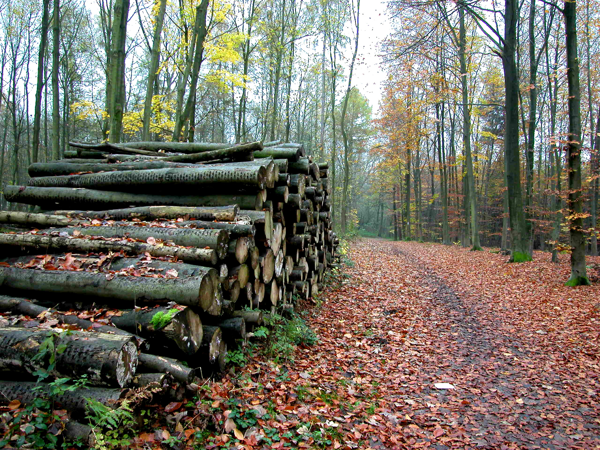 Knechtstedener Wald bei Dormagen, NRW, Deutschland